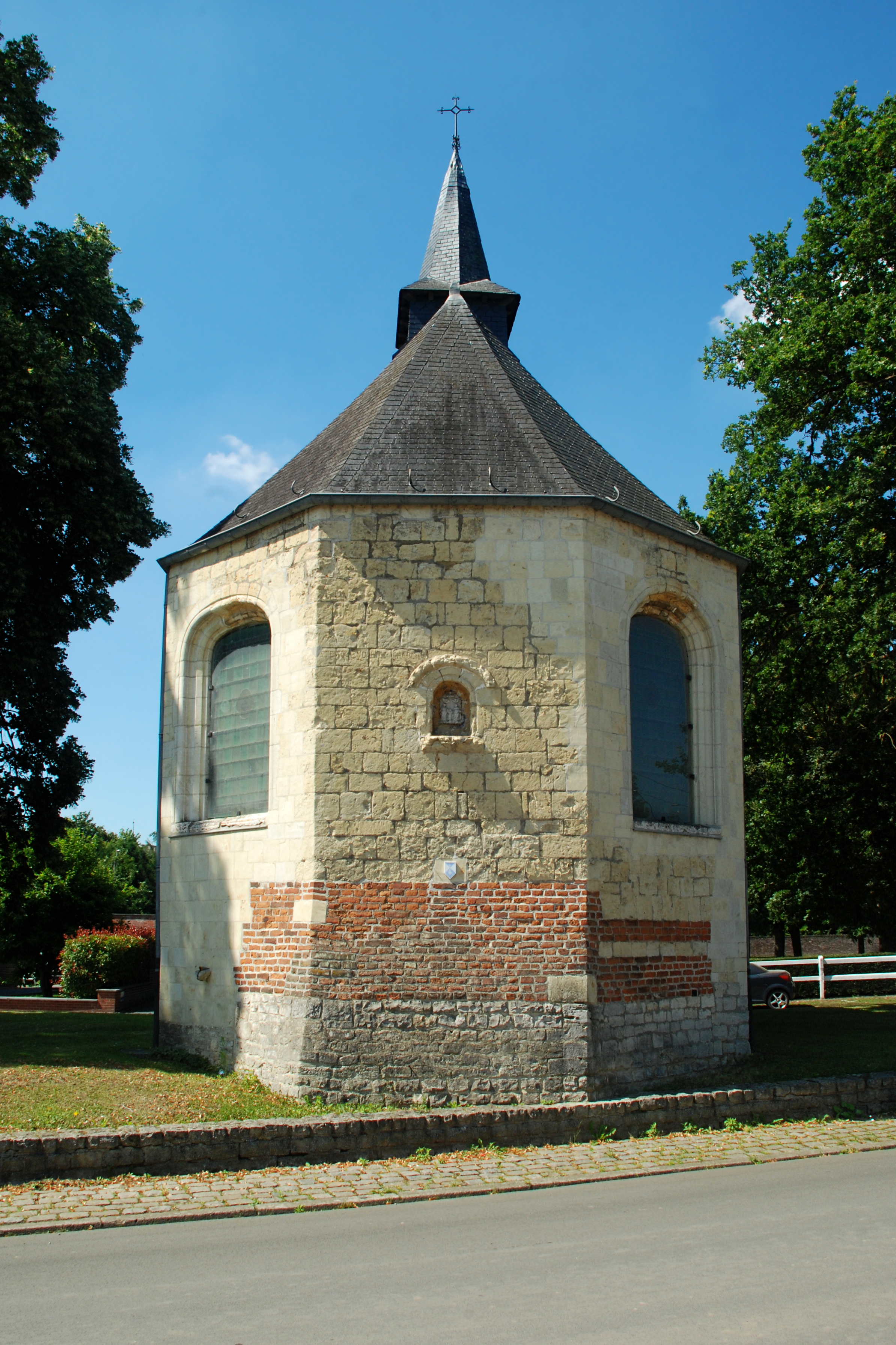 Belgique - Brabant wallon - Hélécine - Linsmeau - Chapelle Notre-Dame de la Colombe